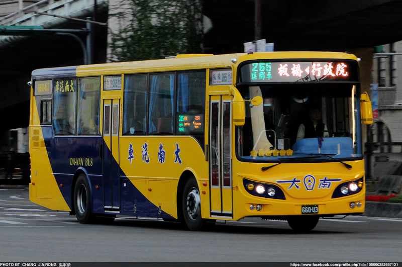 HINO - RK8JRVA - 660-U3